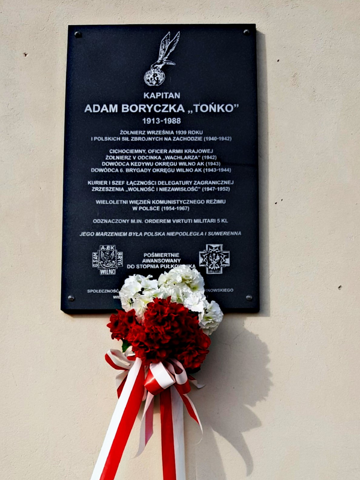 Tablica upamiętniająca Adama Boryczkę na fasadzie Domu Ludowego w Wierzchosławicach